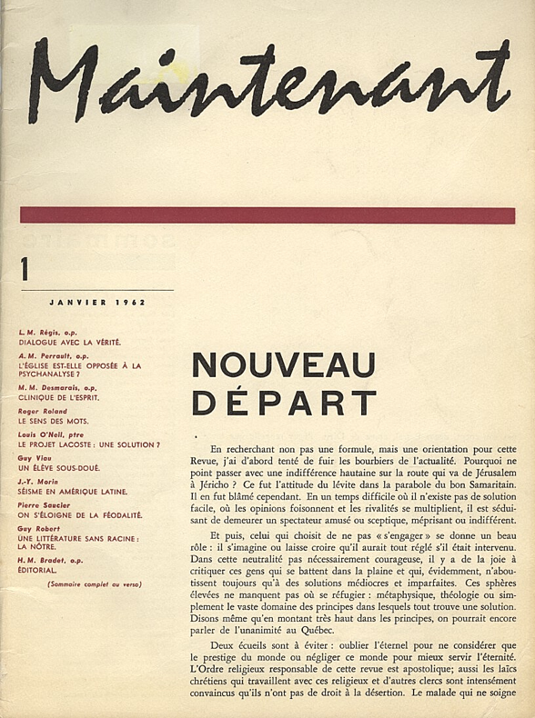 Page couverture du numéro 1 de la Revue Maintenant. Janvier 1962.